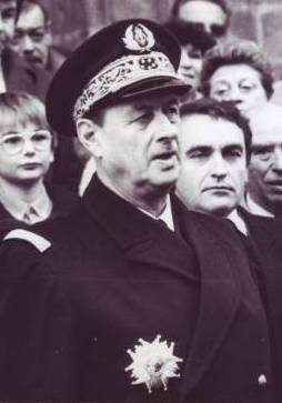 Admiral Phillippe de Gaulle (* 1921), Sohn von Charles de Gaulle, rechts daneben der RPR-Politiker Bruno Chauvierre.